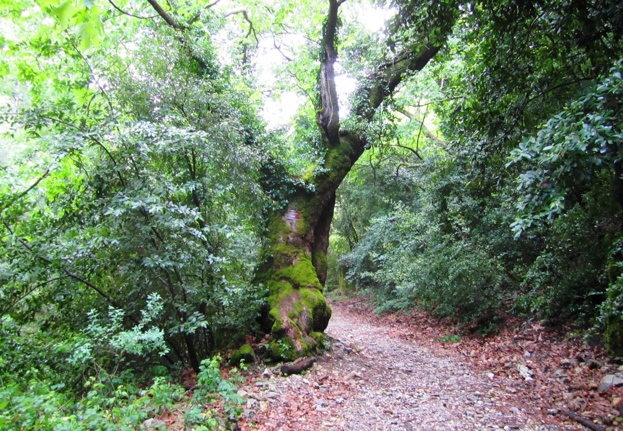 Wanderweg im Dilek Nationalpark